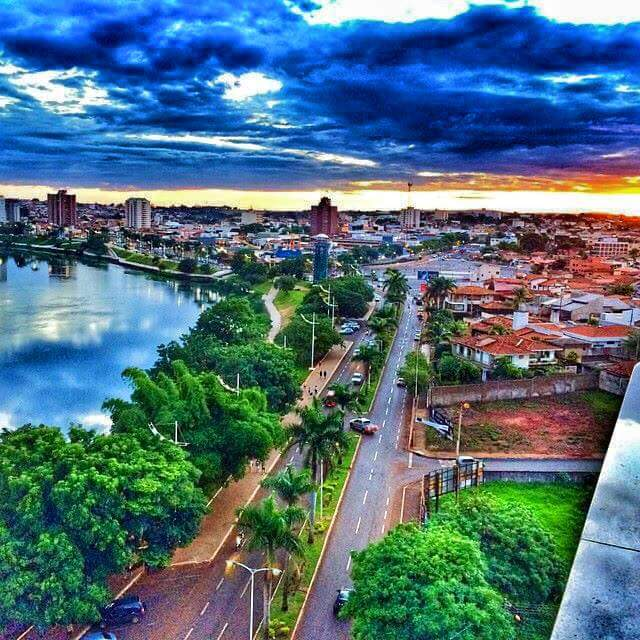 Vista parcial de Itumbiara, em Goiás.